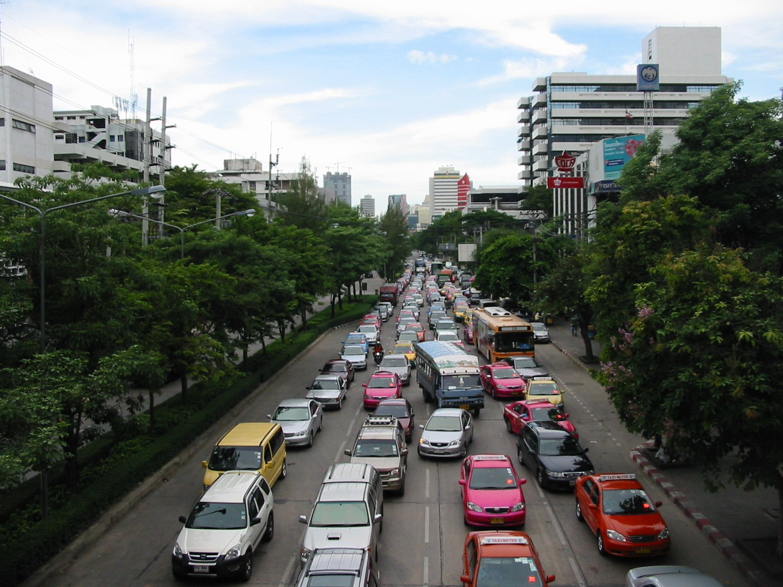 Thanon Henri Dunant